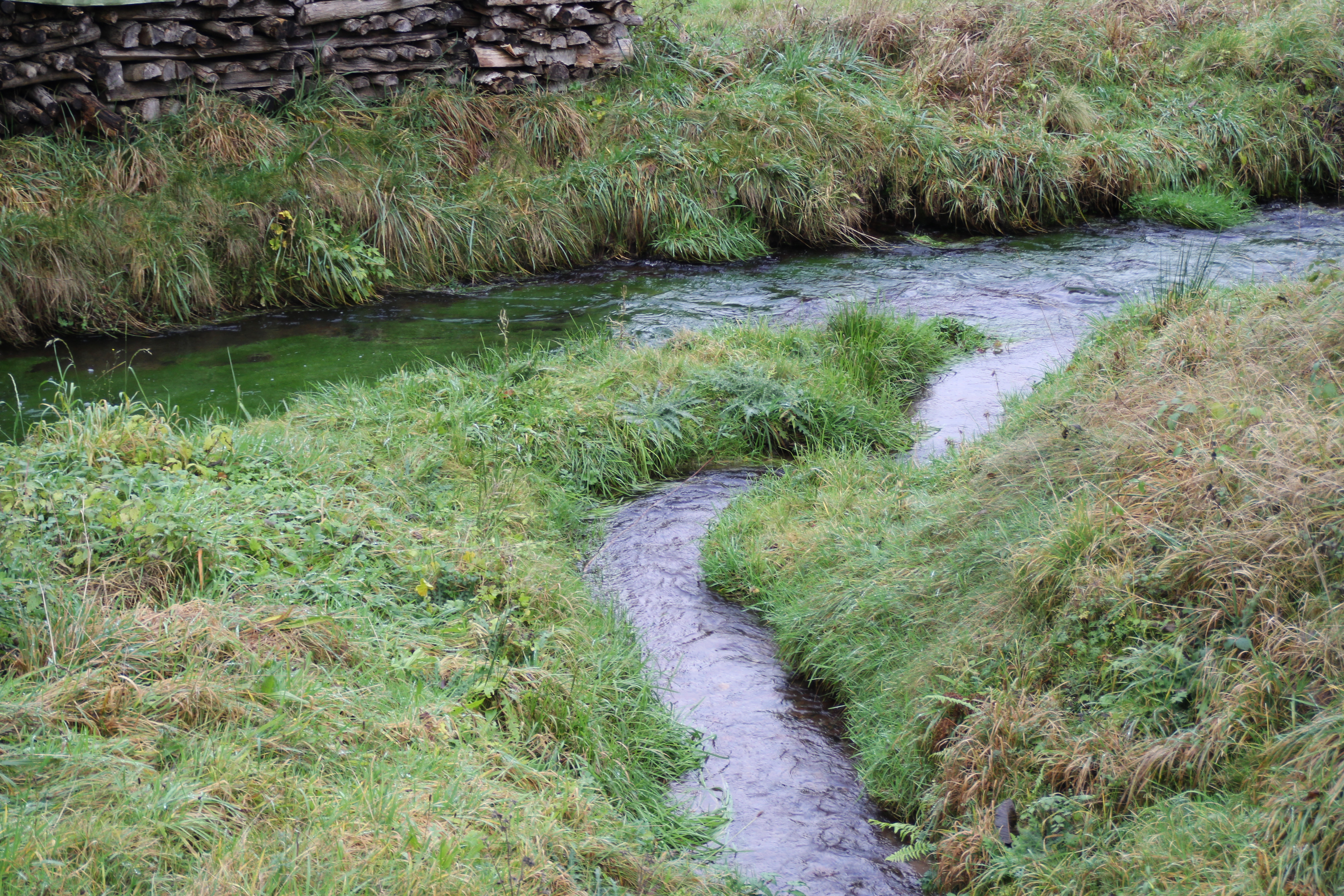 Der Schöllenbach (vorne) mündet in die Itter (v. links. n. rechts)